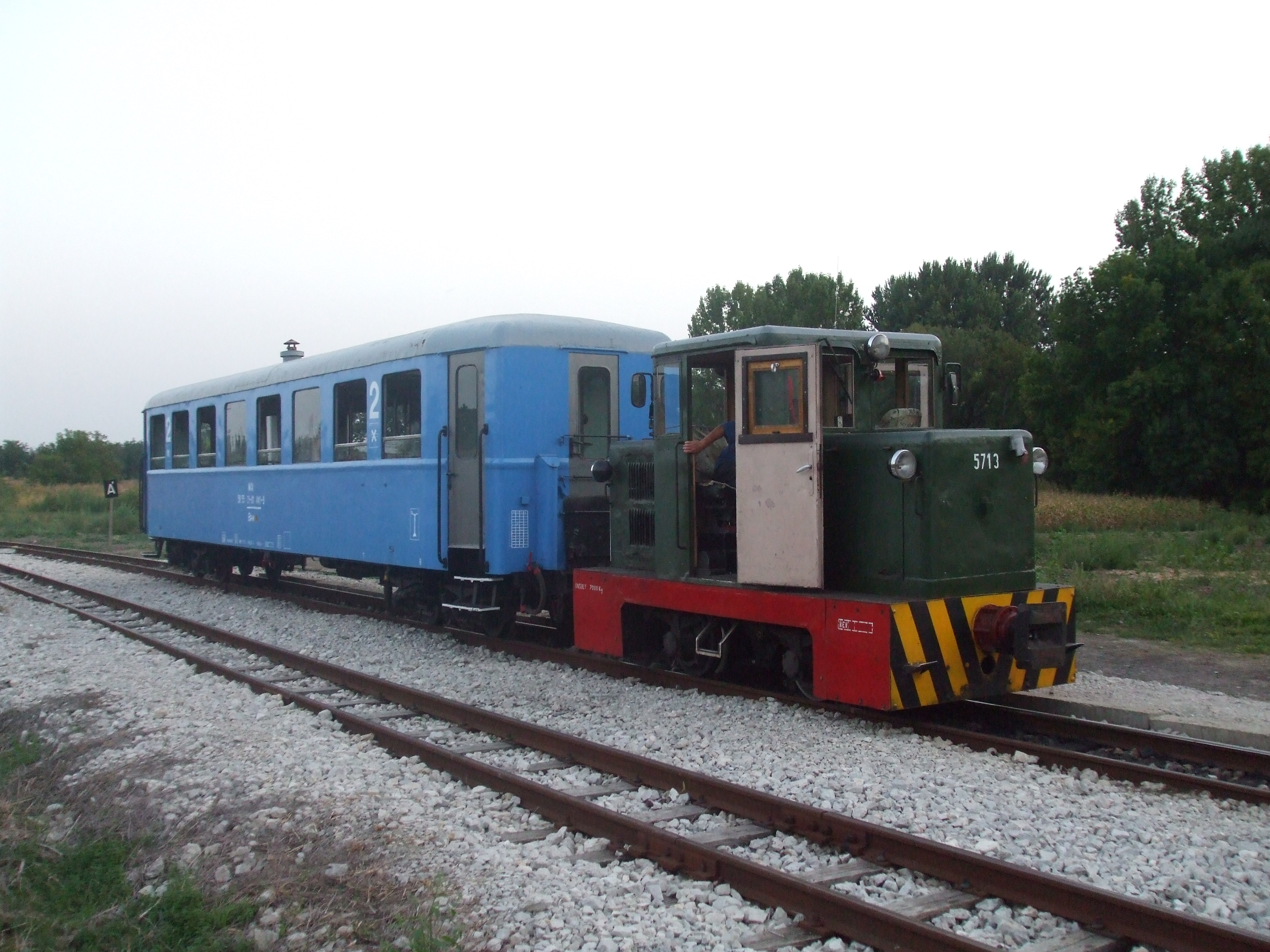 A GV 5713 pályaszámú C–50-es mozdony egy Kecskeméti Kisvasútról származó, és ezért kék színű kocsival Somogyszentpál állomáson.